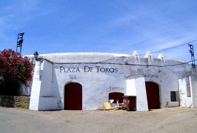 Plaza de toros de Alcántara, provincia de Cáceres, España